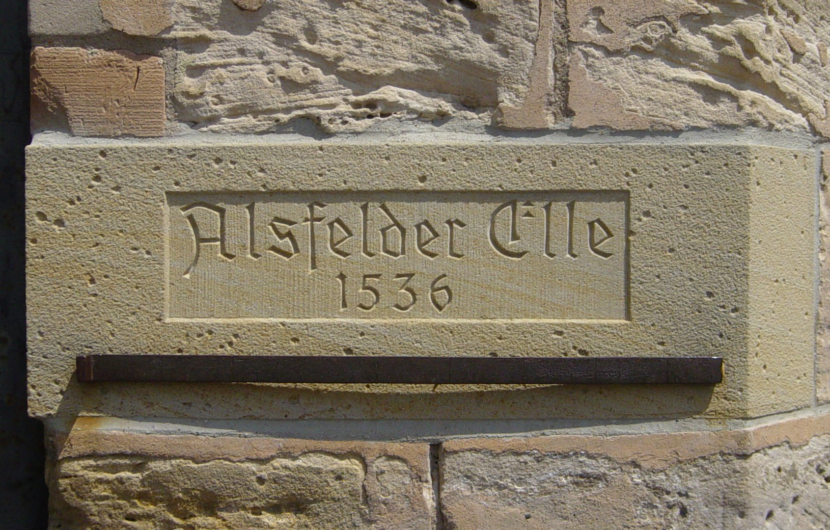 Alsfelder Elle, angebracht am Alsfelder Rathaus